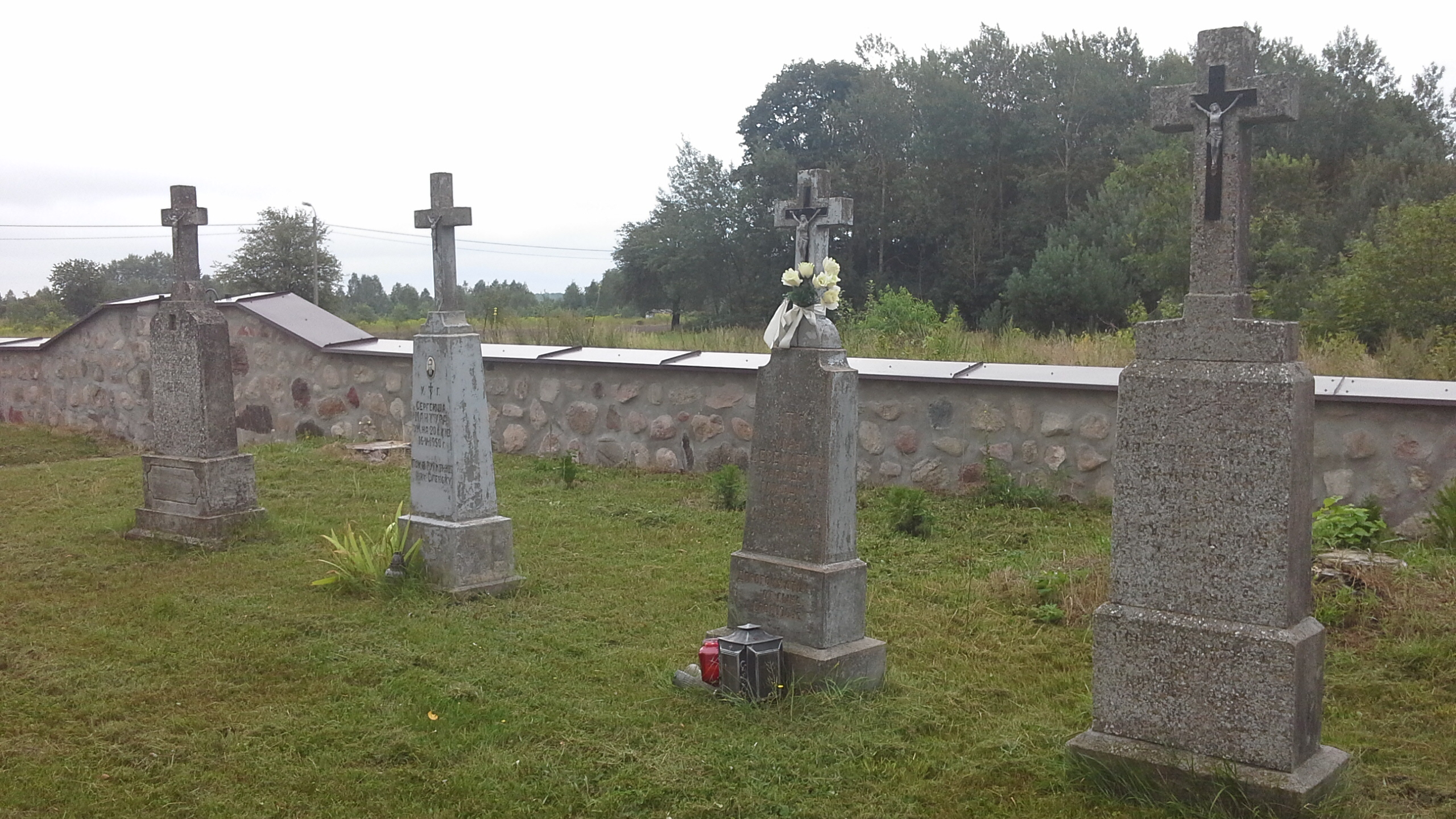 Krzyże wotywne oraz ustawione ku pamięci poległych członków rodziny przy cerkwi w Żerczycach (większość z okresu po II wojnie światowej)